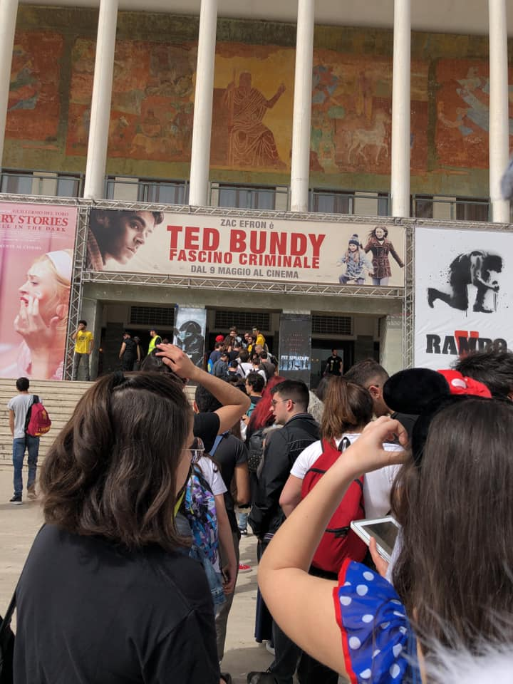 Foto scattata il 26/04/2019 al Napoli Comicon ritraente la coda per l'anteprima italiana di Fate/stay night: Heaven's Feel II. lost butterfly al Teatro Mediterraneo, parte del complesso della Mostra d'Oltremare.